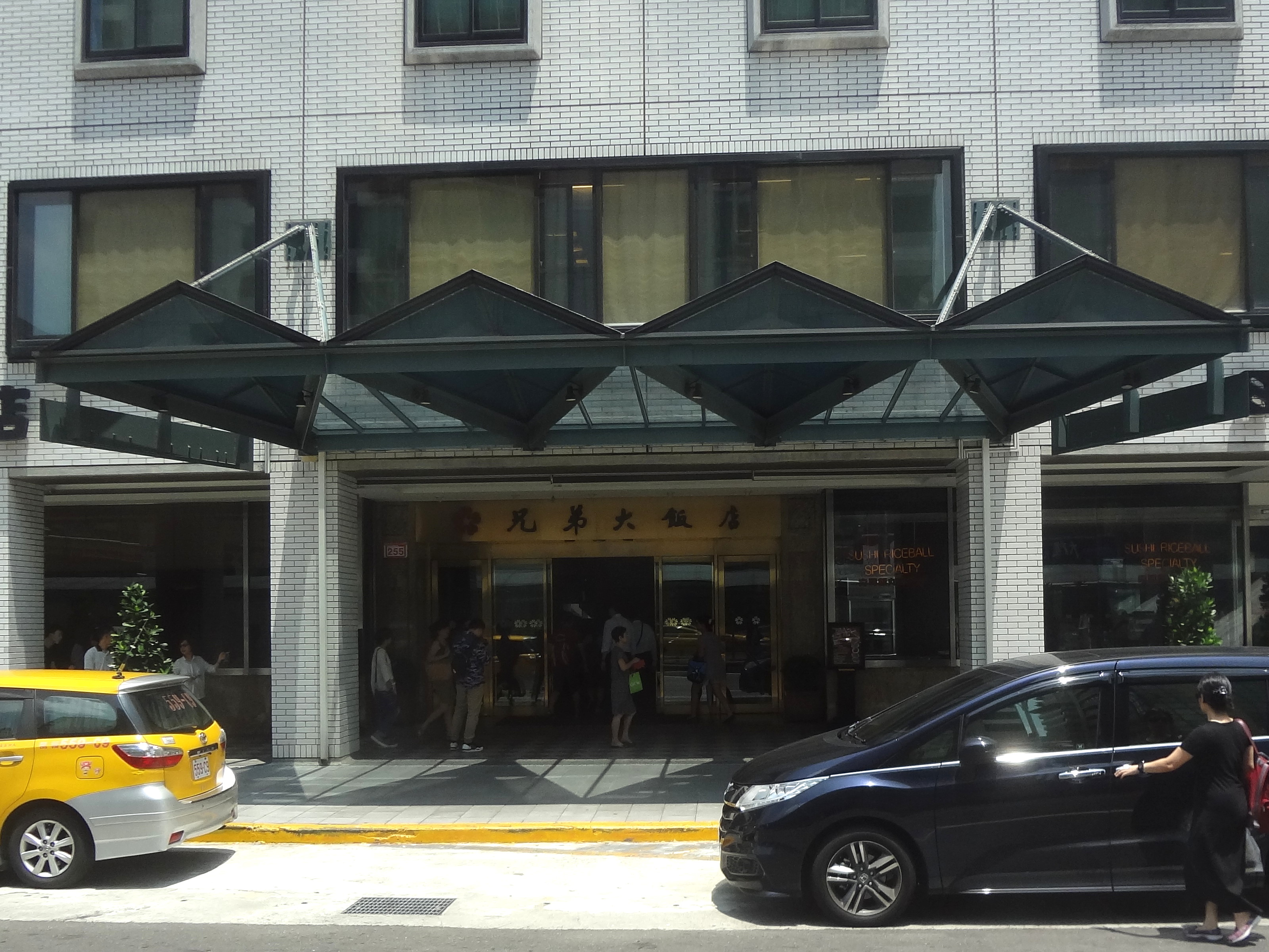 中文（台灣）: 兄弟大飯店大門。